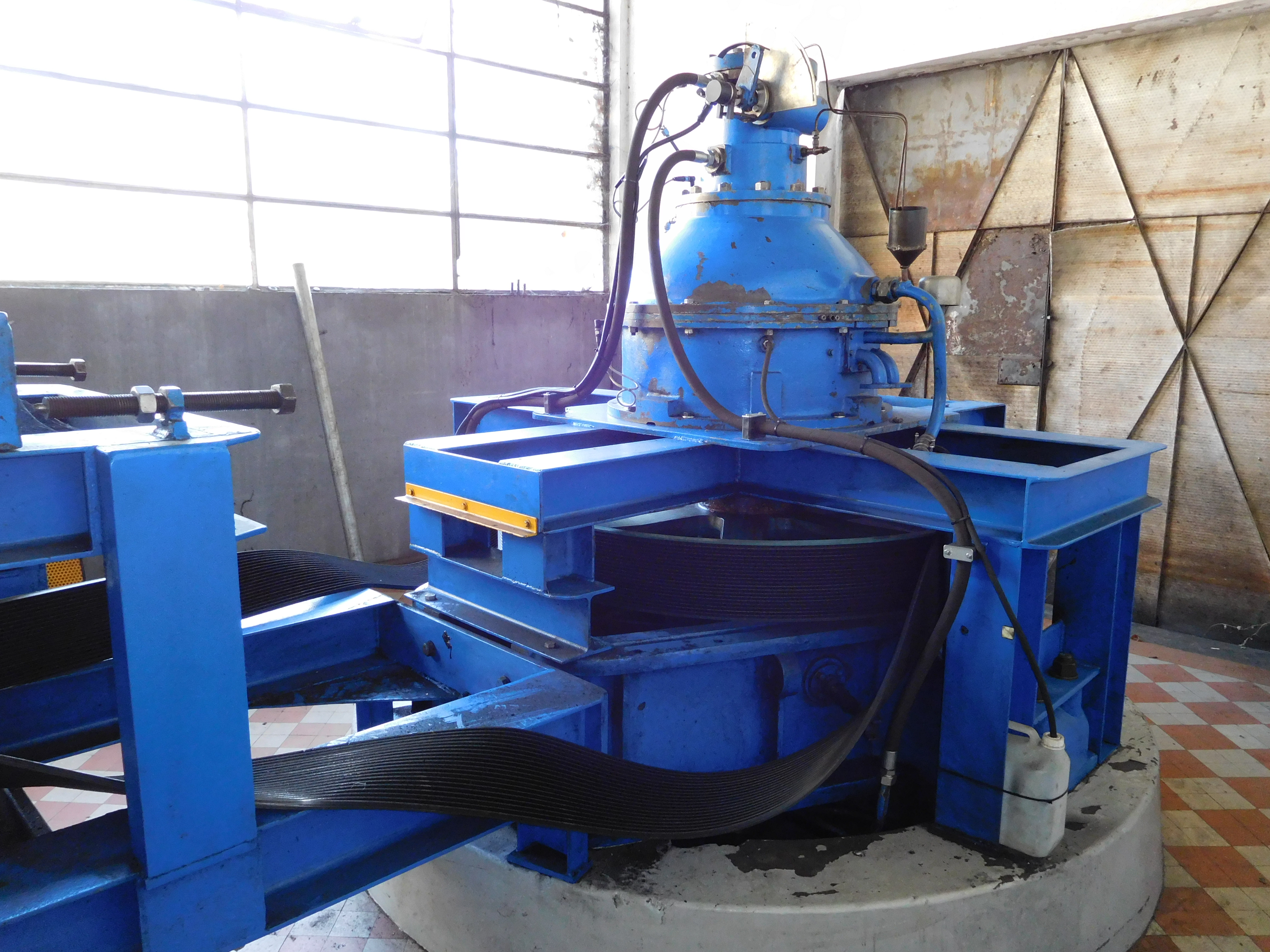 Turbine Neyrpic à tourbillons. La hauteur de chute, augmentée, permet à la centrale de développer une puissance de 120 kW. La courroie coûte environ 3 000 €. Micro-centrale hydroélectrique sur la rivière Isle à Gabillou, près de Mussidan (Dordogne, France).